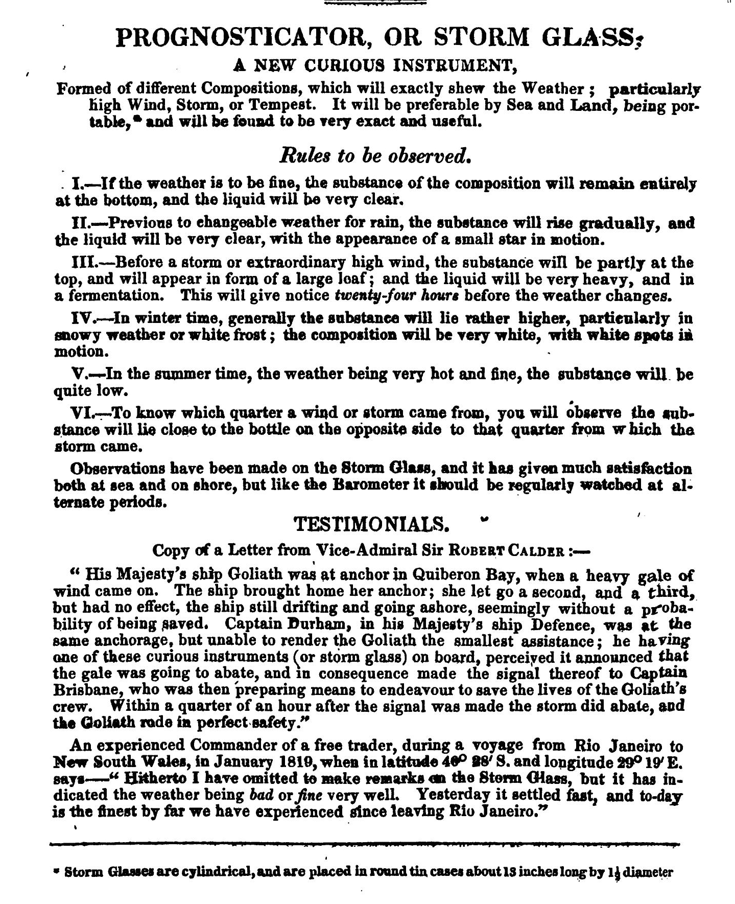 Storm glass advertisement